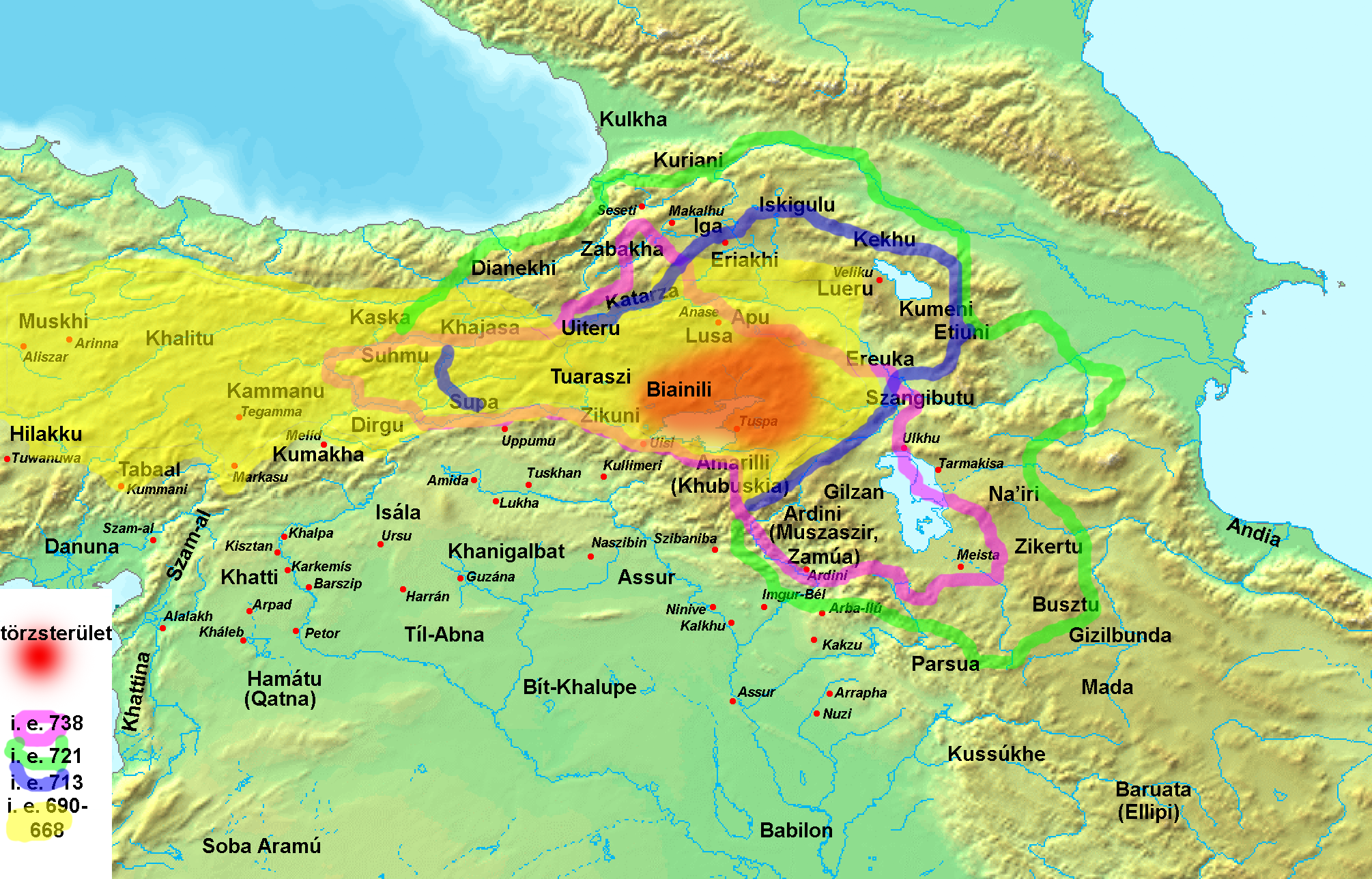 Urartu területváltozásainak térképe i. e. 738-668 között